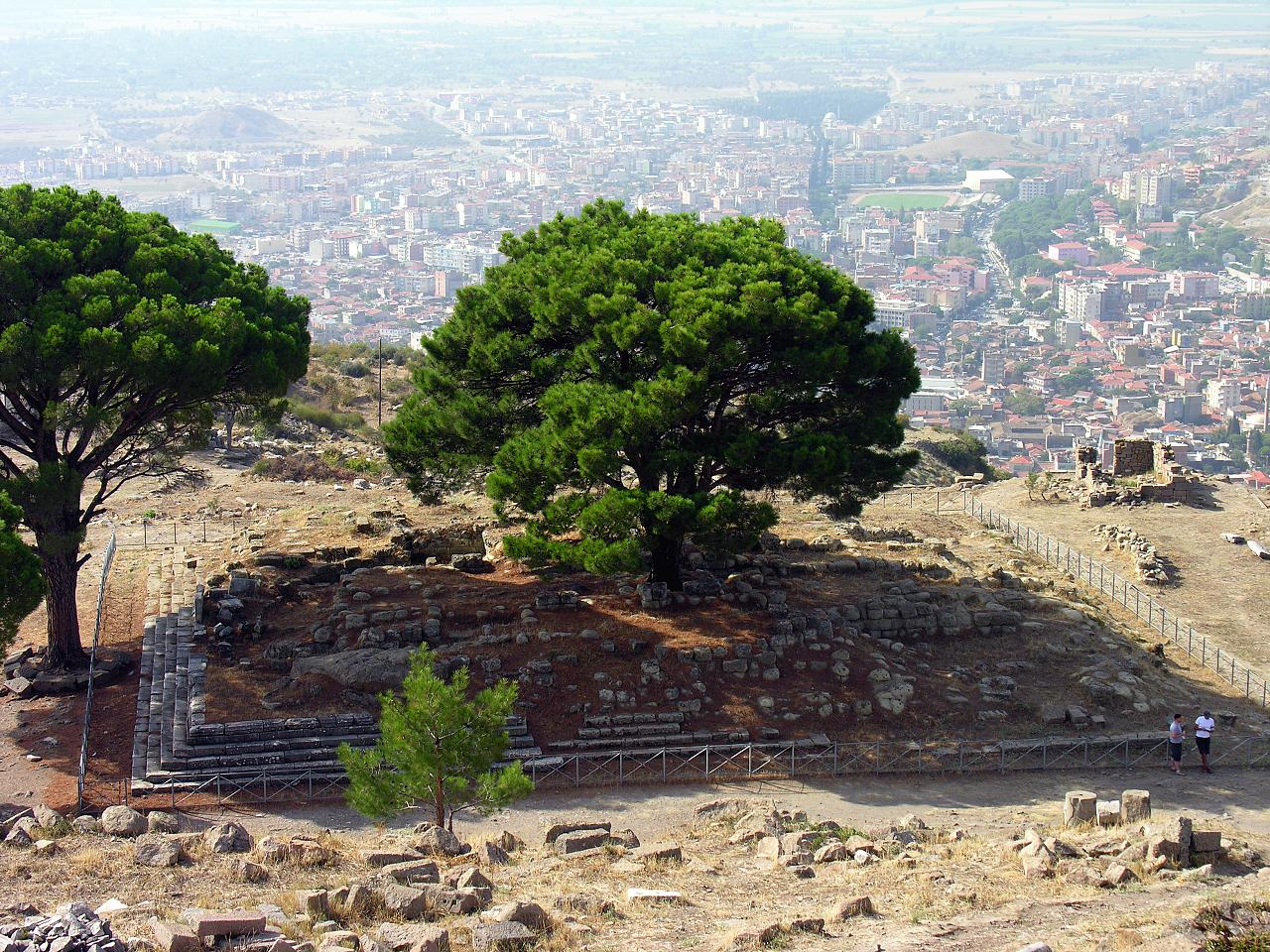 Turkey-2893